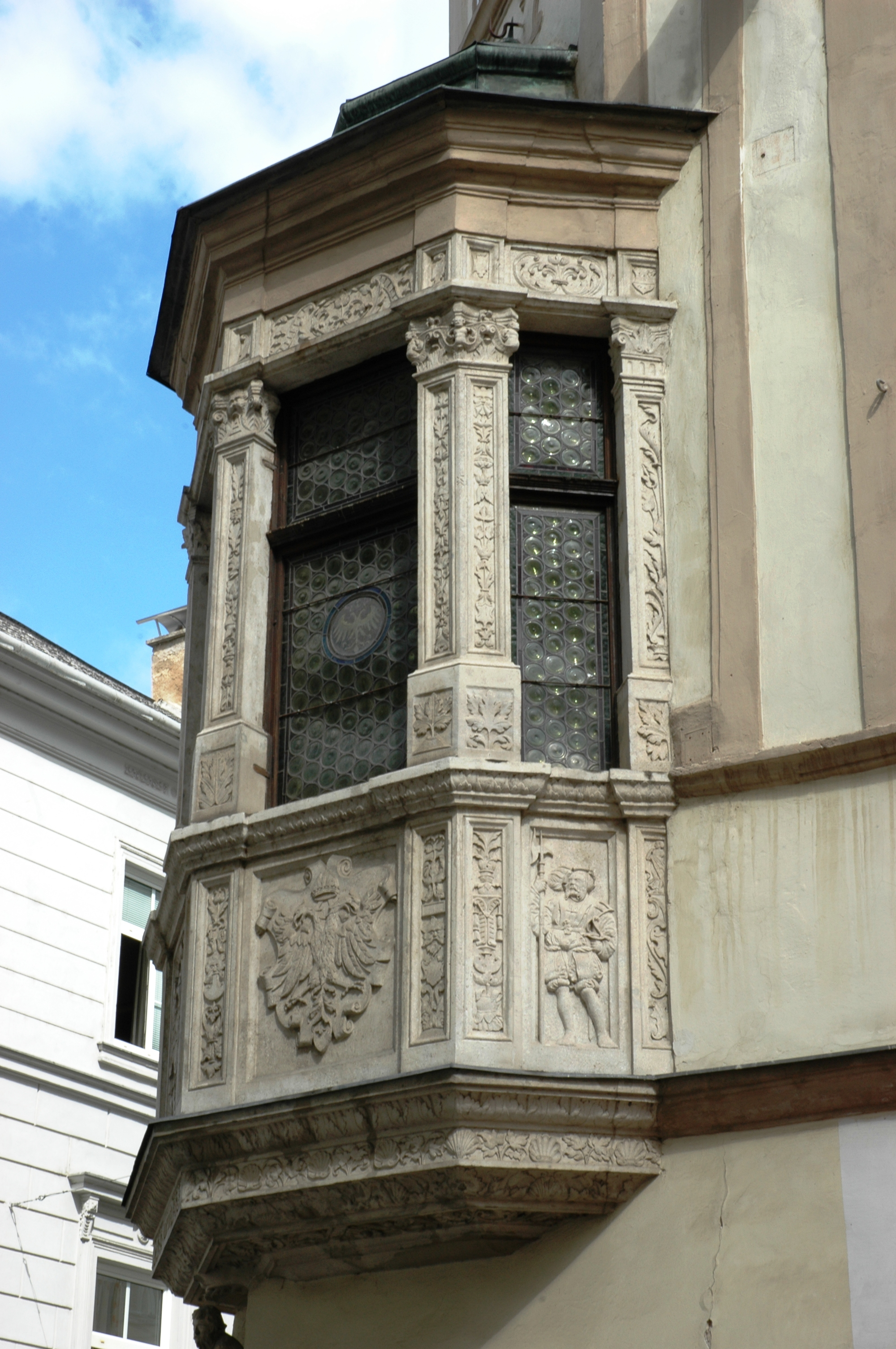 Erker vom Rathaus der Stadt Krems